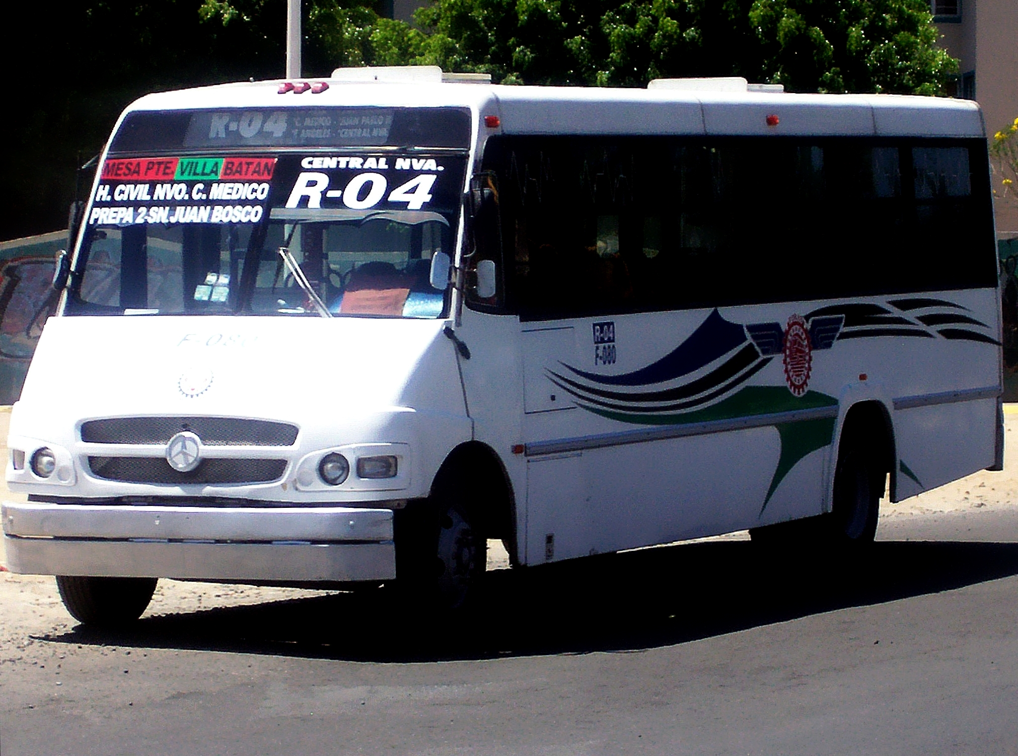 Autobus de la empresa de Transporte guadalajara, F.O.R.A.S. (Federación Obrera Revolucionaria de Agrupaciones Sindicales).